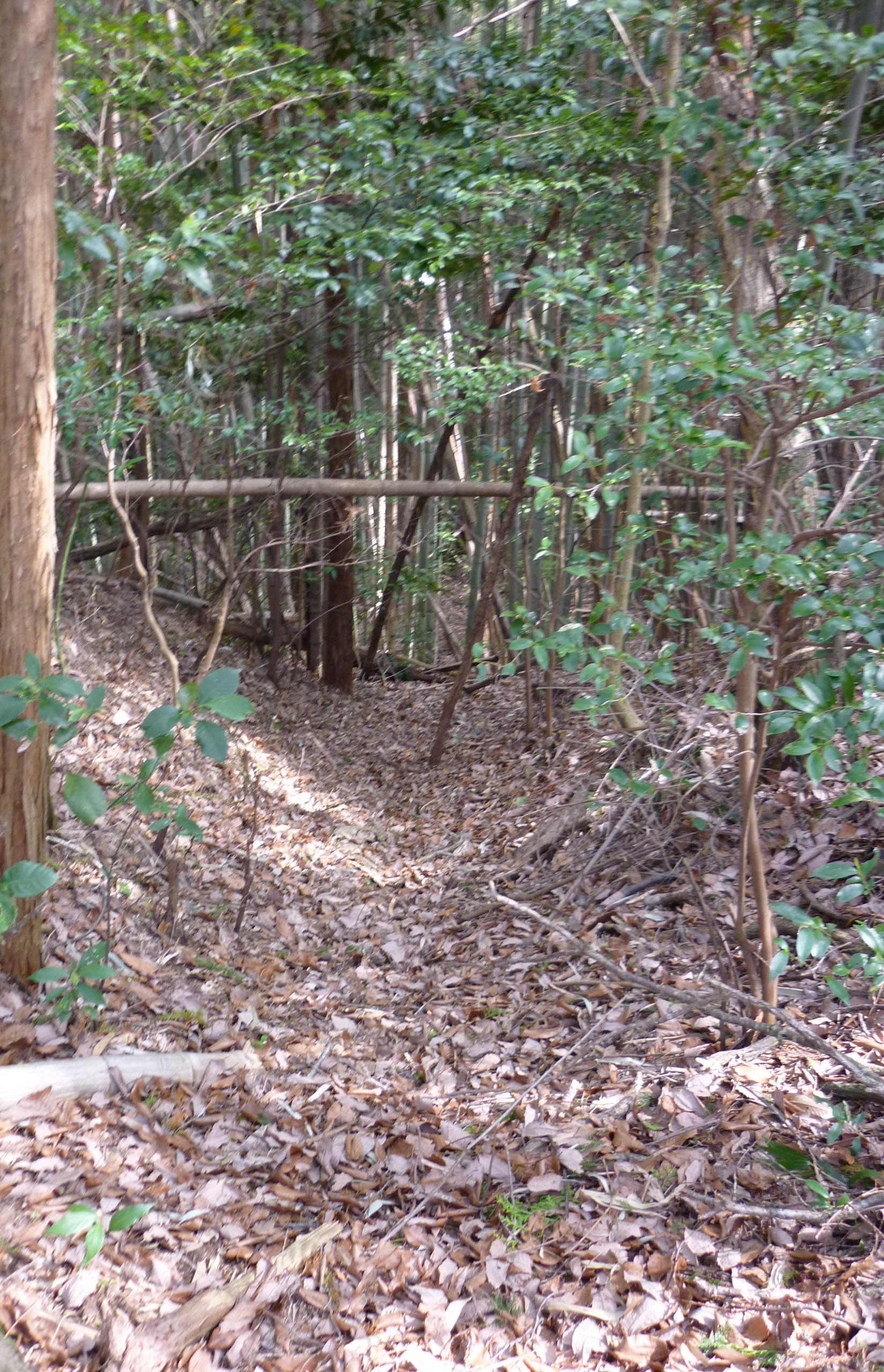 堀切跡